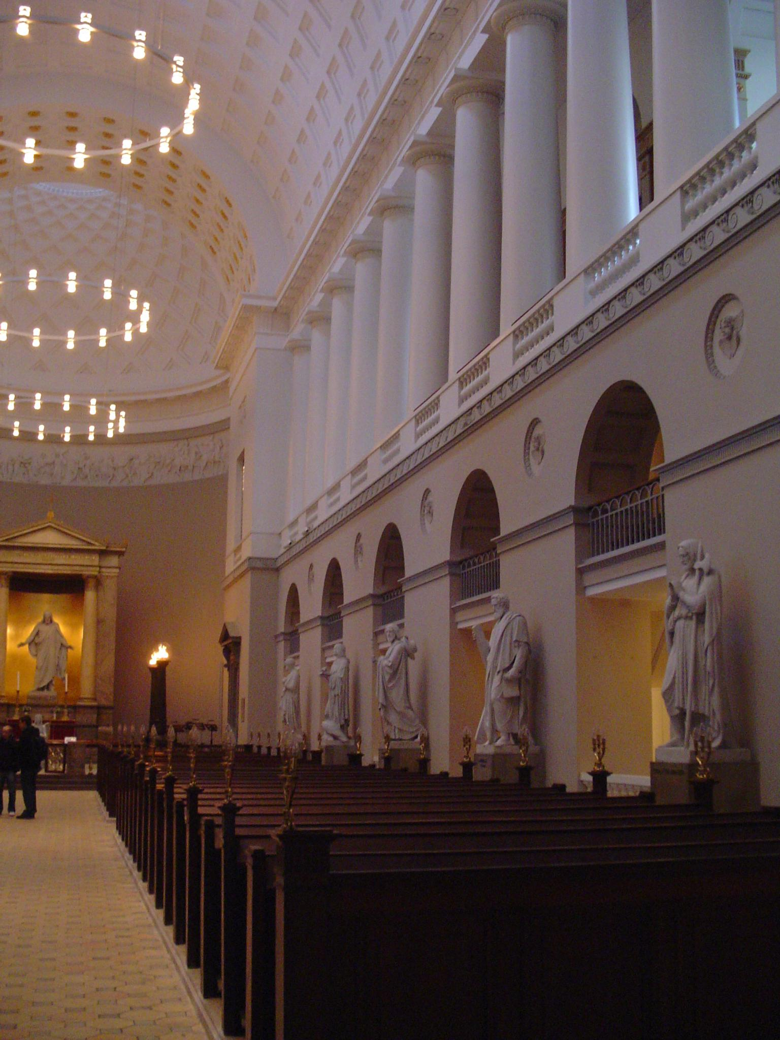 Vor Frue Kirke (København). Picture by me on 27/2-2006.